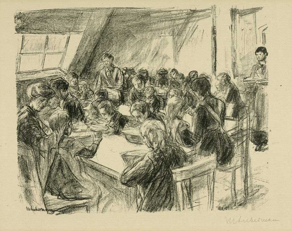 Max Liebermann: Kindervolksküche, 1915. Lithographie, 24 x 29,1 cm; aus der Folge "Aus der Kriegszeit"